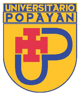 Escudo de Universitario de Popayán.